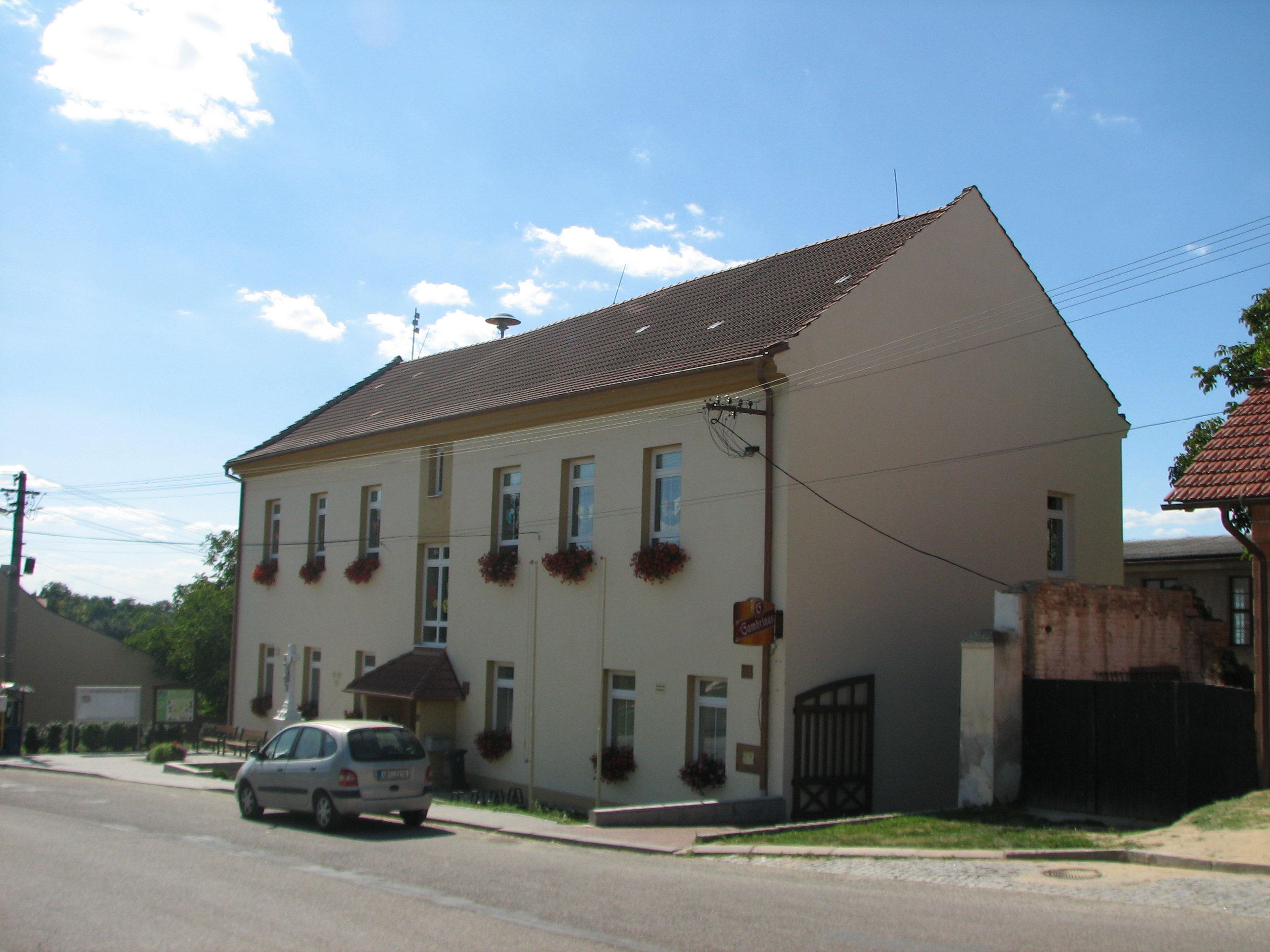 Česky: Nenkovice - obecní úřad